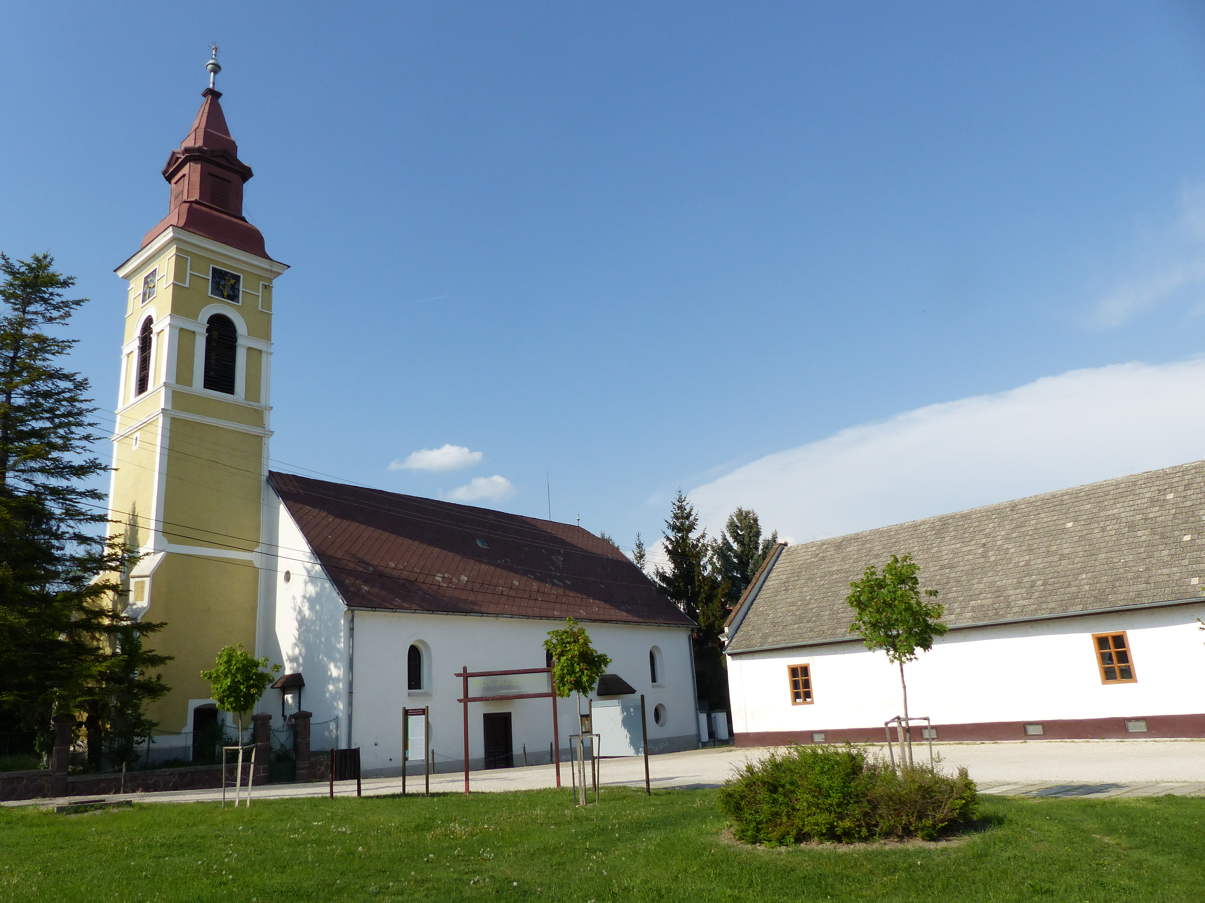 A 2018. április 29-én, vasárnap készült felvételen a Református templom. Balatonkenese.